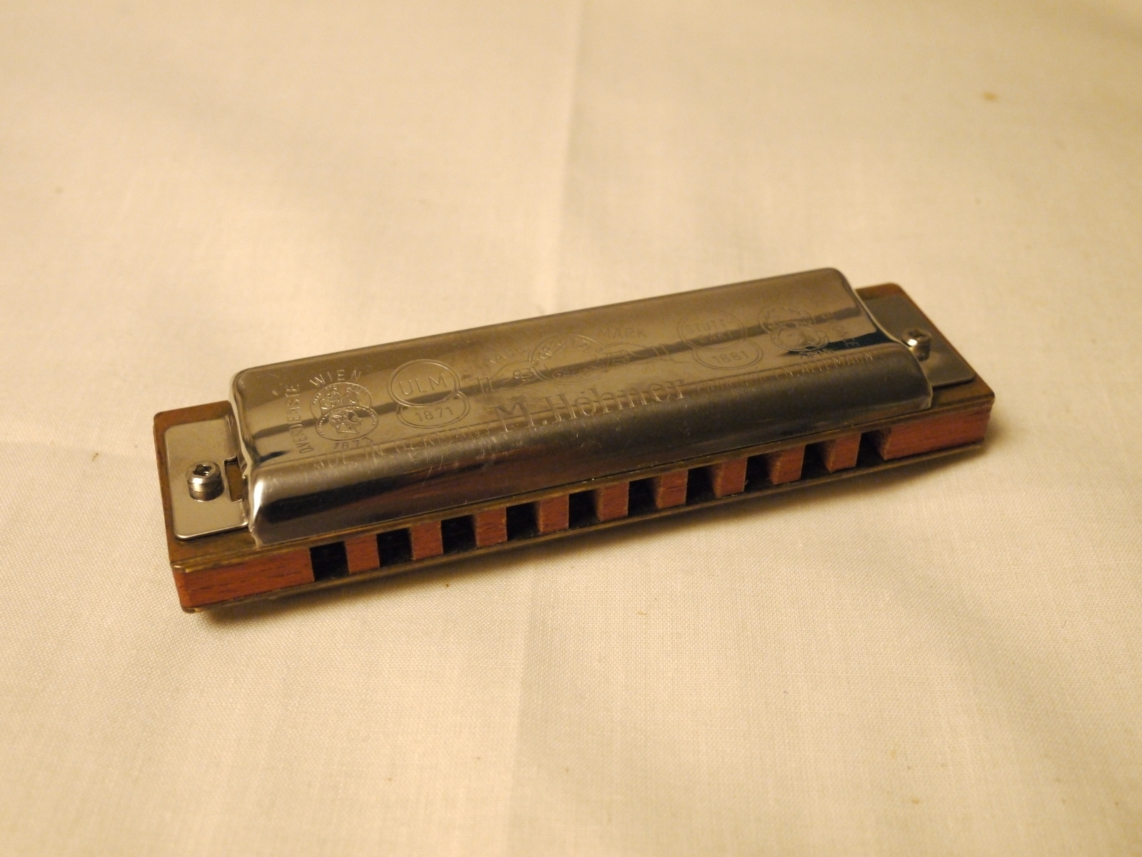 パンケーキレンズでどれだけ寄れるか実験